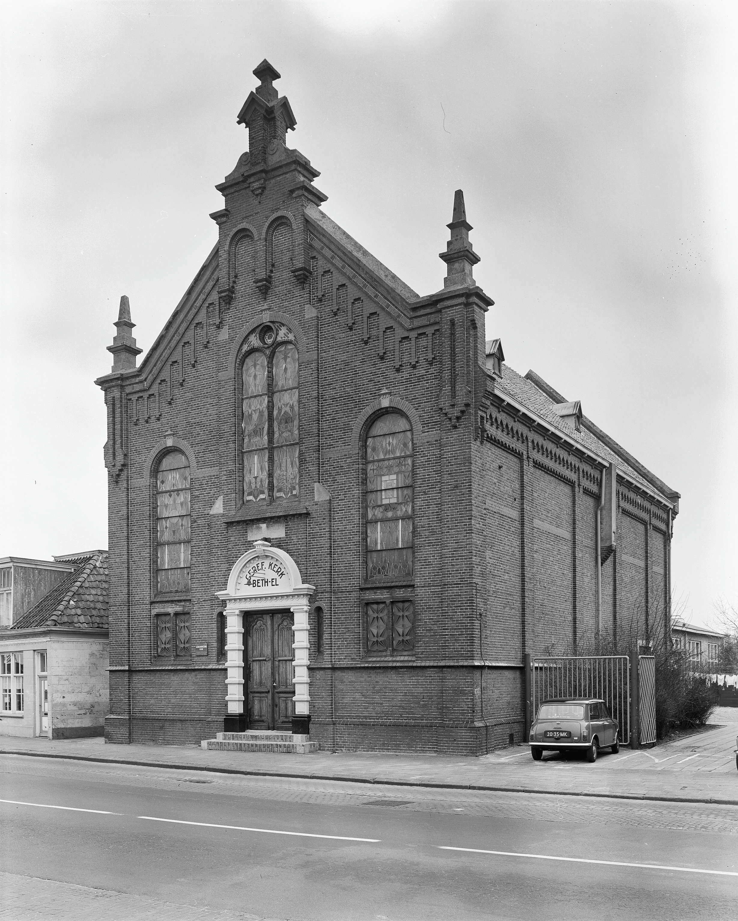 vm. Synagoge: exterieur, Groningerstraatweg